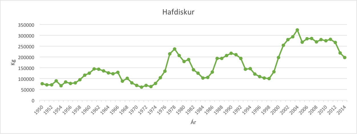 Þessar aflatölur frá Food and Agriculture Organization of the United Nations(FAO) sýna hversu mikil veiði hefur verið á hafdiskum í norðvestur Atlantshafi.